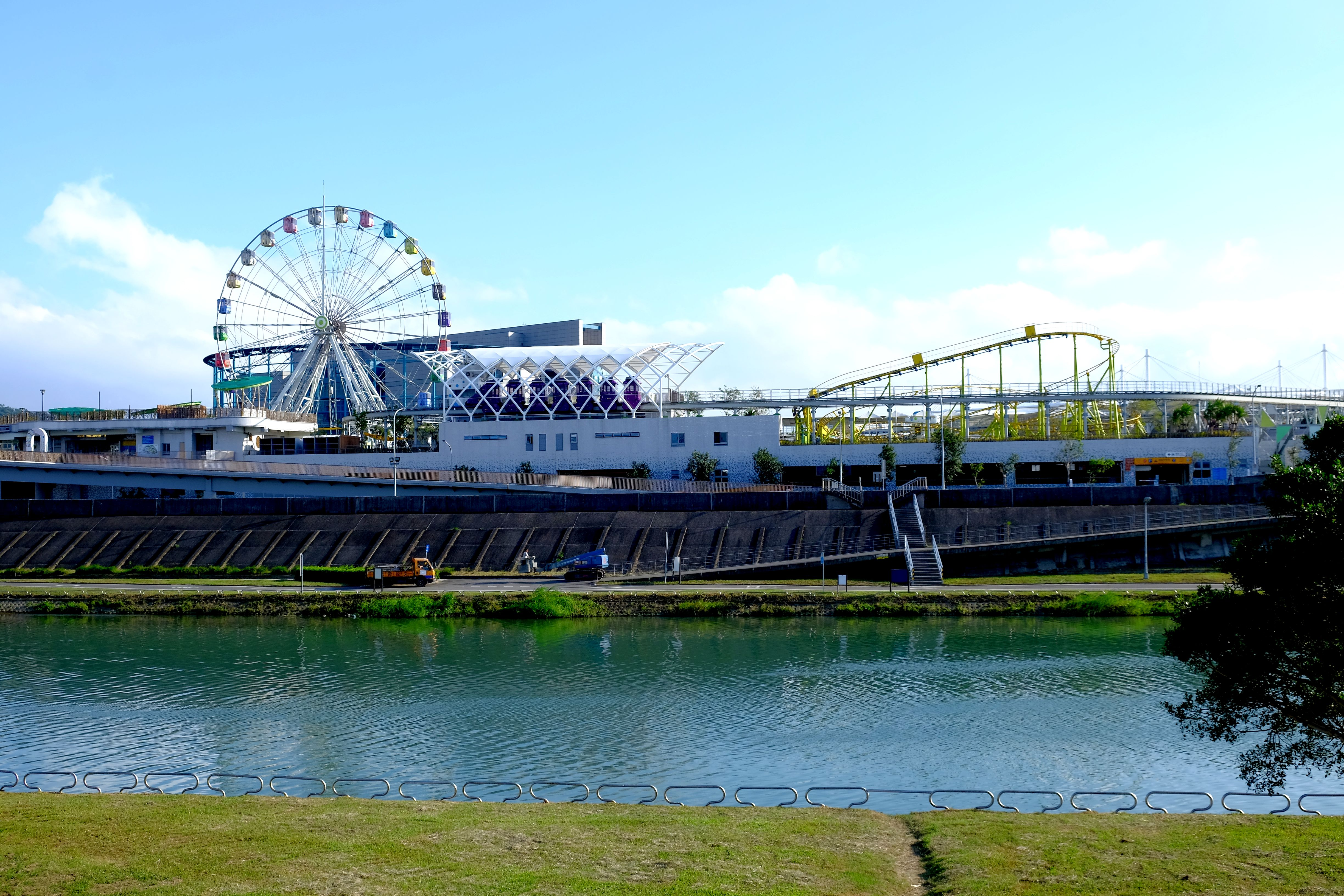 Taipei Children's Amusement Park